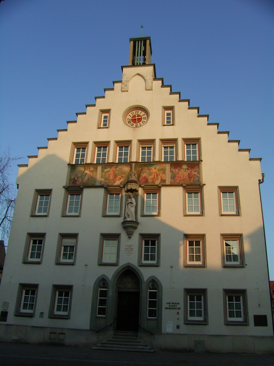 Amtshaus in Weingarten (Württemberg)